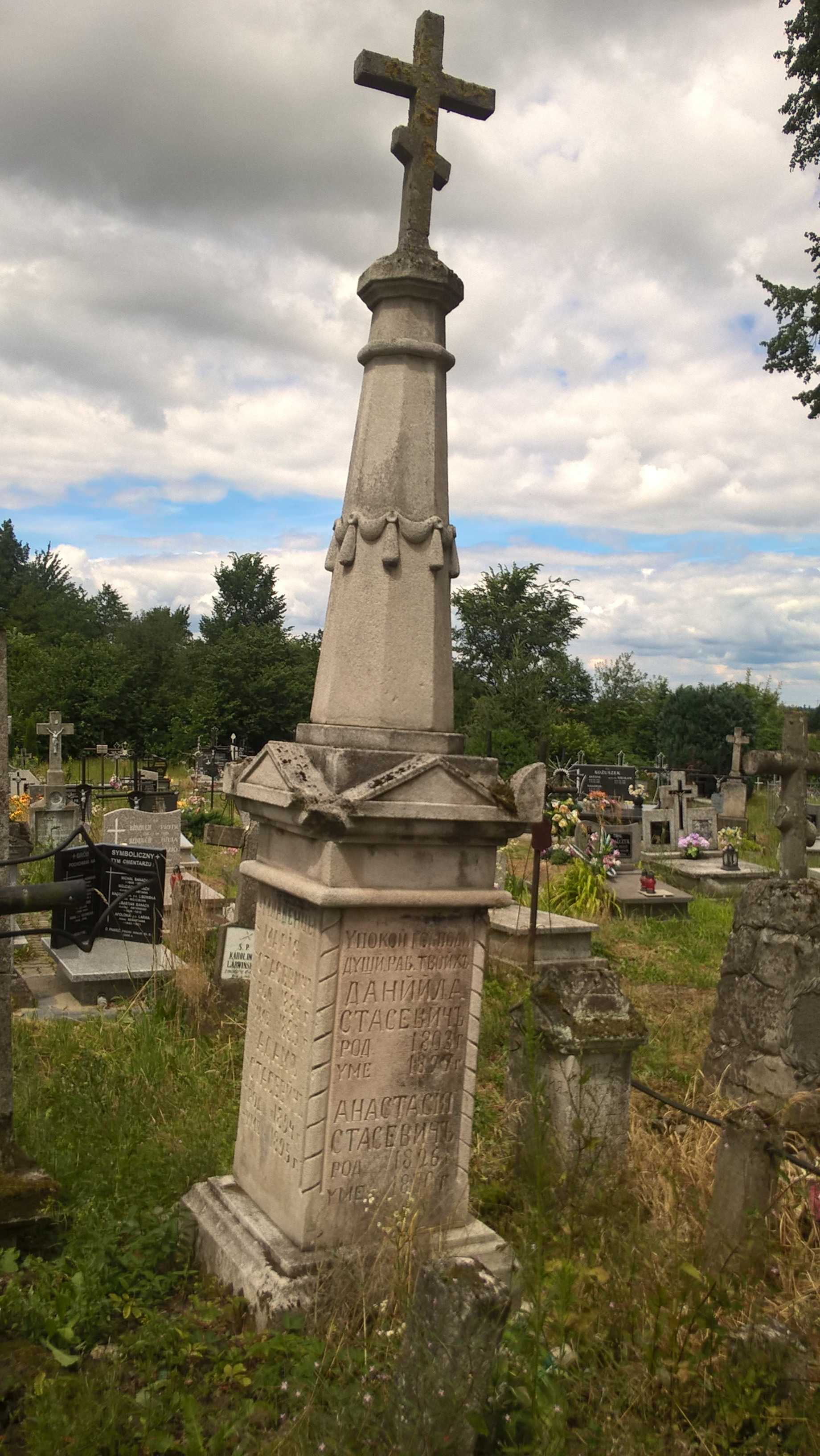 Cmentarz katolicko-prawosławny w Tarnogrodzie